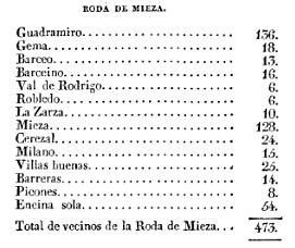 Fragmento del libro con los datos del Censo de la Corona en el siglo XVI